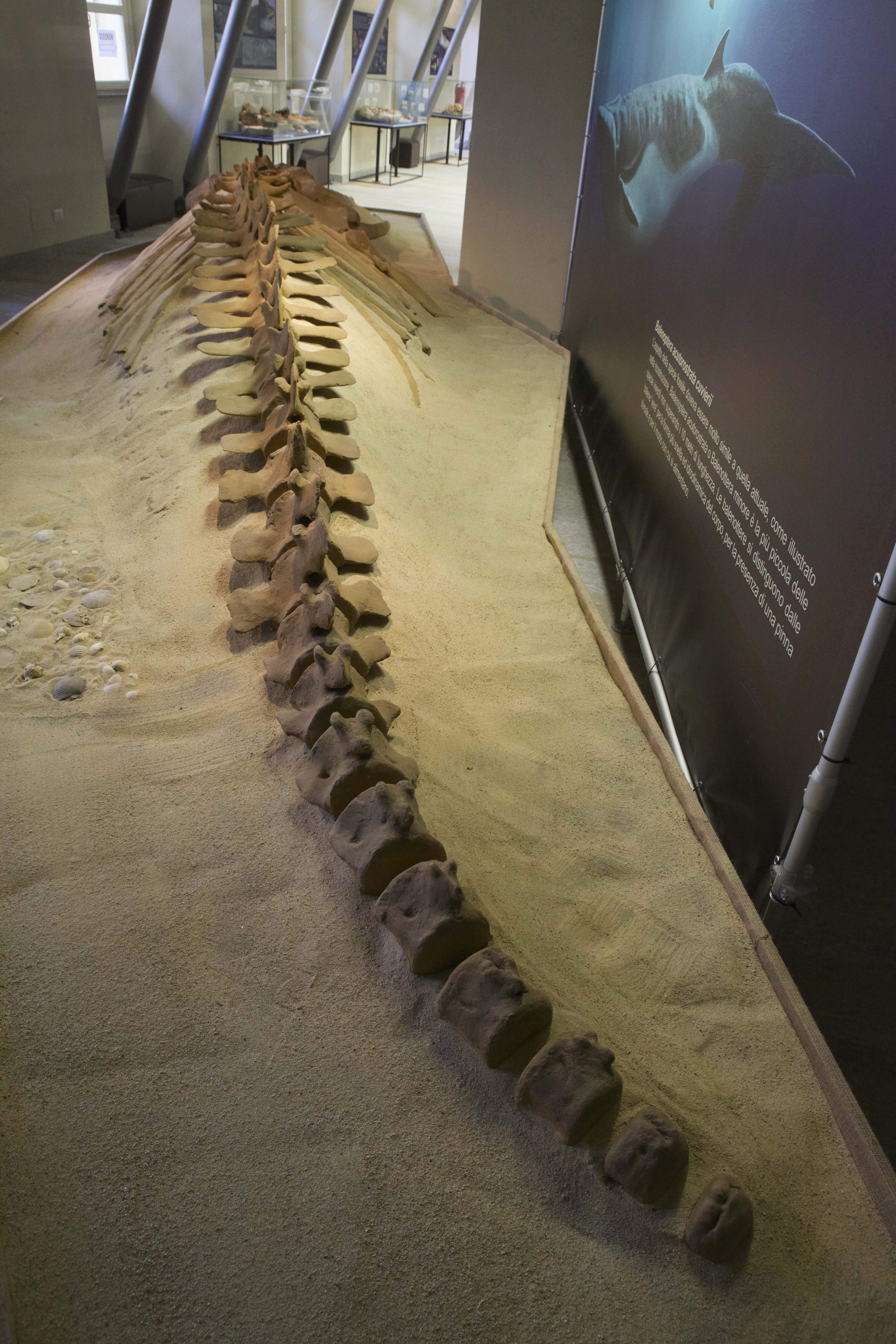 Michelerio - Museo Palentologico di Asti scheletro di Balaenoptera acutorostrata cuvierii This is a photo of a monument which is part of cultural heritage of Italy.